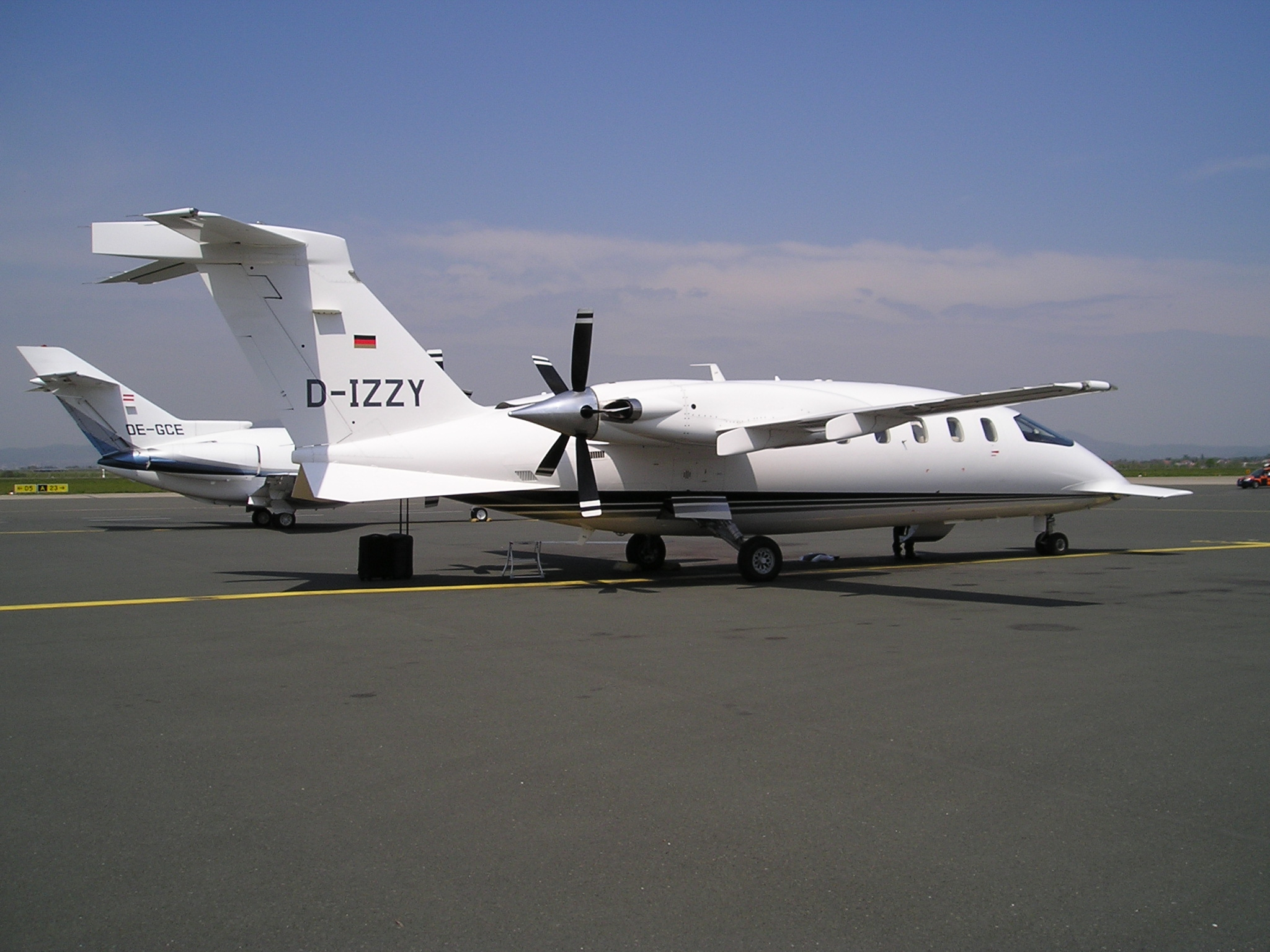 Piaggio P-180 Avanti at Zagreb airport, tail number D-IZZY